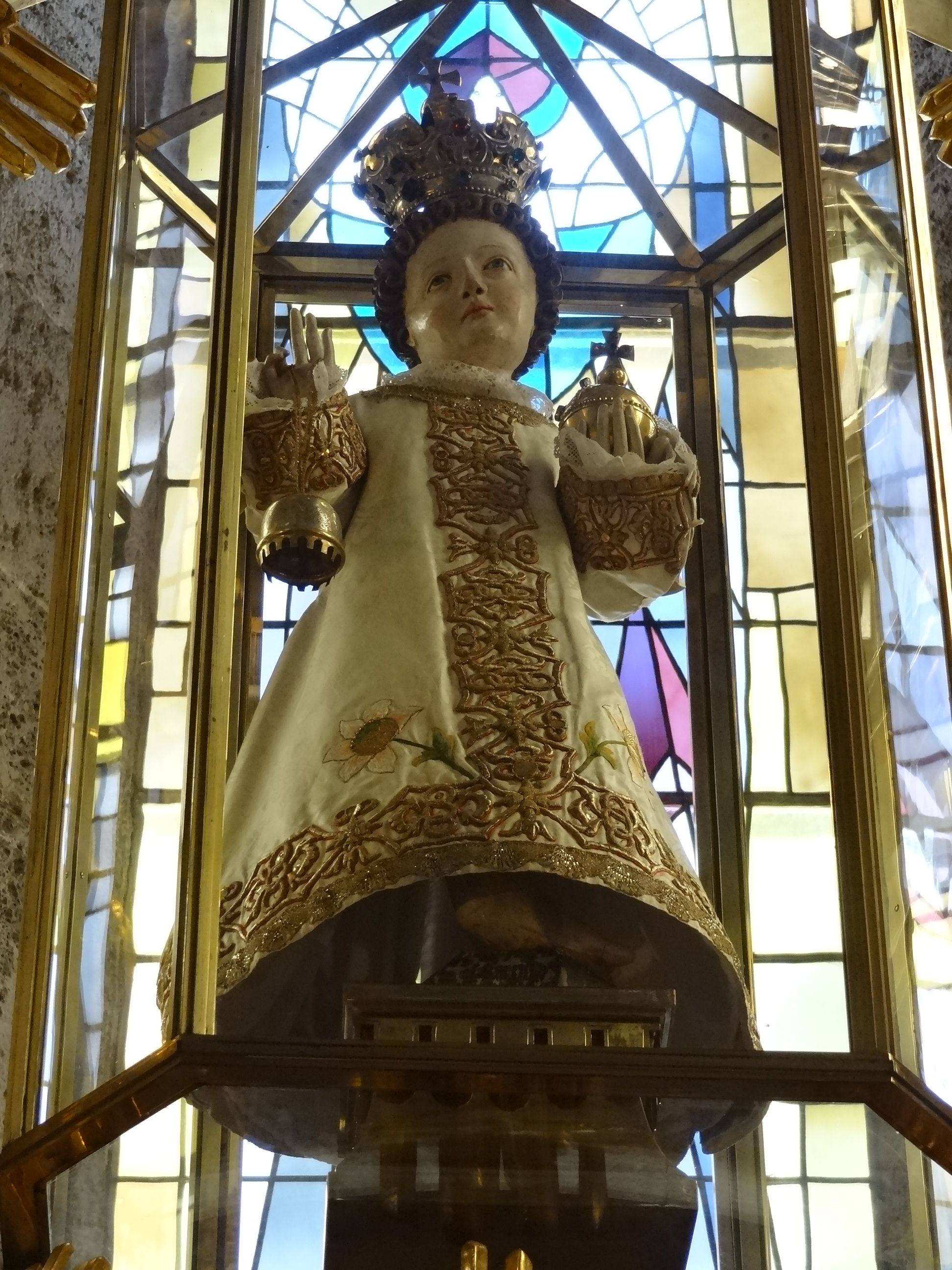 Saints Peter and Paul Church (Filzmoos) Filzmooser Kindl